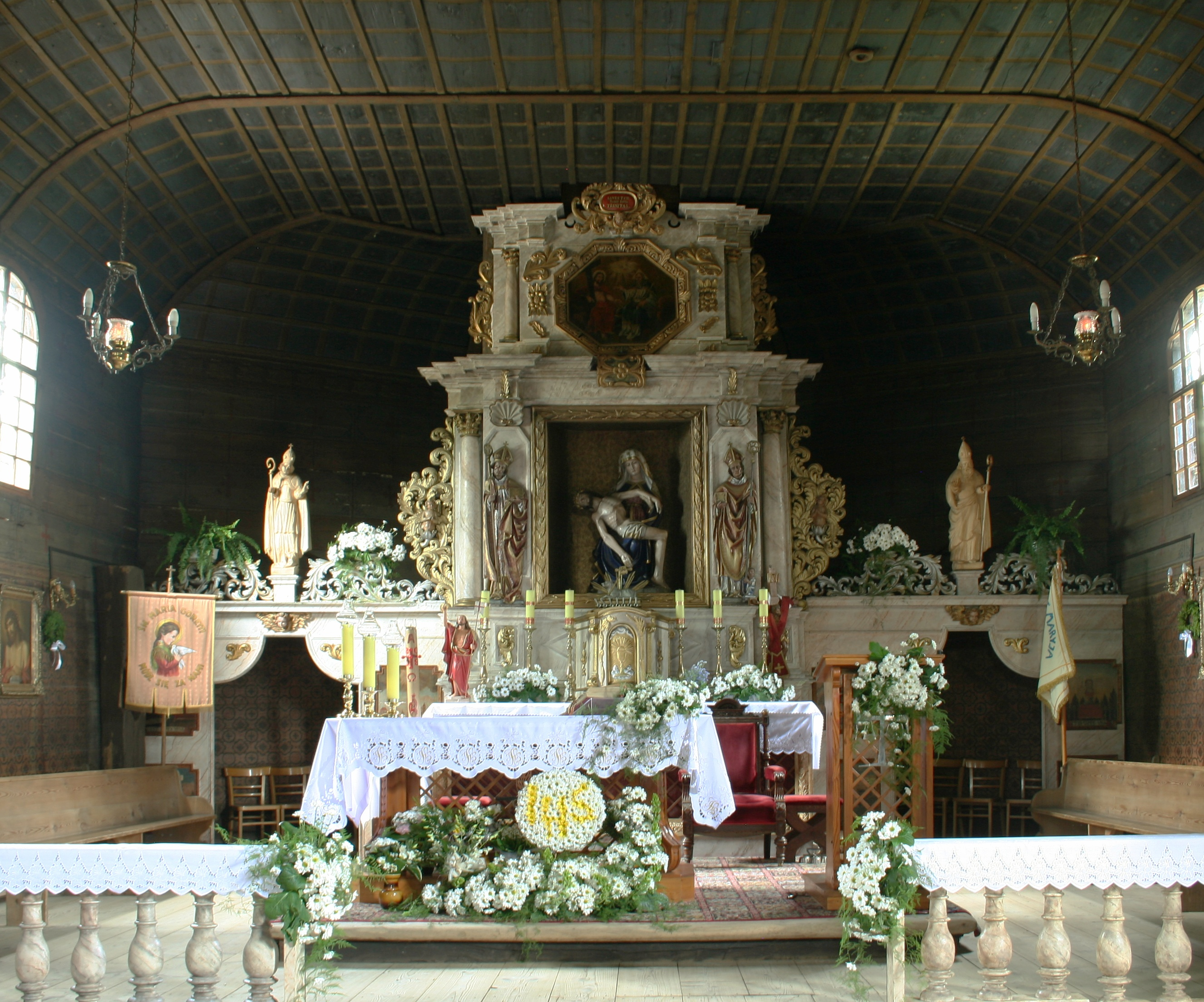 Ołtarz główny o kościele św. Trójcy w Koszęcinie